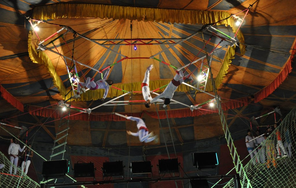 ഫ്ലൈയിംഗ് ട്രപ്പീസ്, കൊല്ലത്തു നടക്കുന്ന ഗ്രാൻഡ് സർക്കസ്സിൽ നിന്ന് ആഗസ്റ്റ് 18, 2012